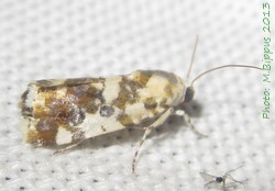 Acontia transfigurata stumpfi (Madagascar)